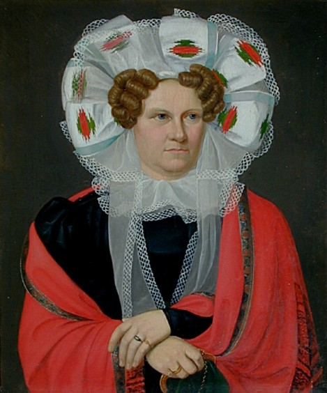 Friederike Brun, geb. Münter 1765 in Gräfentonna bei Gotha. Das Gemälde (46x39 cm)wurde ca.1822 von C.W.Eckersberg gefertigt. Friederike Brun heirate 1782 den Kaufmann Constantin Brun. Nach Umbau von Gut Sopienholm in Dänemark wurde dies eine bekannte Kulturstätte für Adelige, Kaufleute, Dichter,Komponisten, Wissenschaftler. Auch Prinz Christian (späterer König von Dänemark) und Gemahlin waren 1822 auf Gut Sophienholm, dem Zeitpunkt der Anfertigung des Gemäldes.